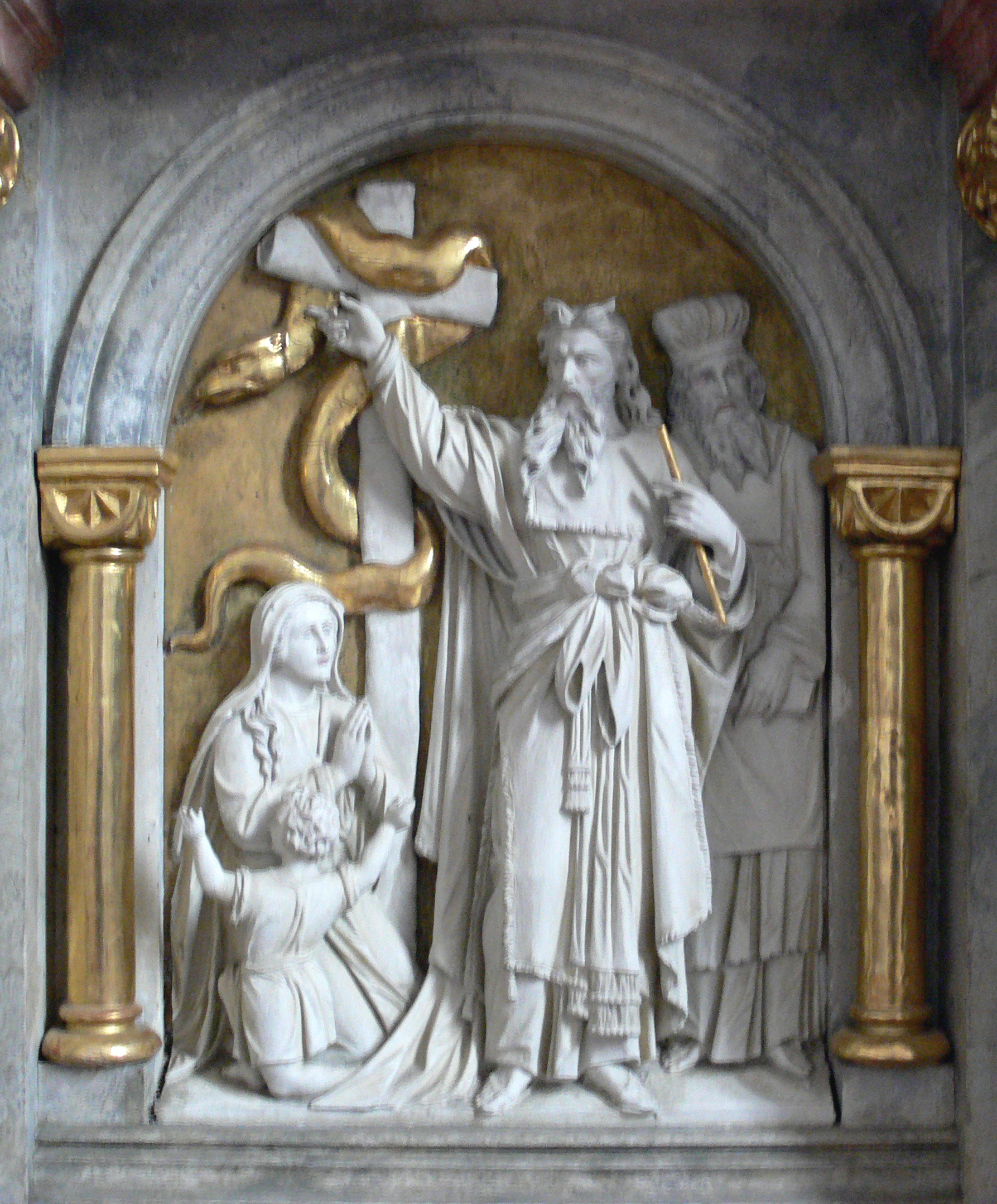 Katholische Pfarrkirche St. Vitus in Altmannshofen, Gemeinde Aichstetten, Landkreis Ravensburg Hochaltar, Detail: Relief "Die eherne Schlange"